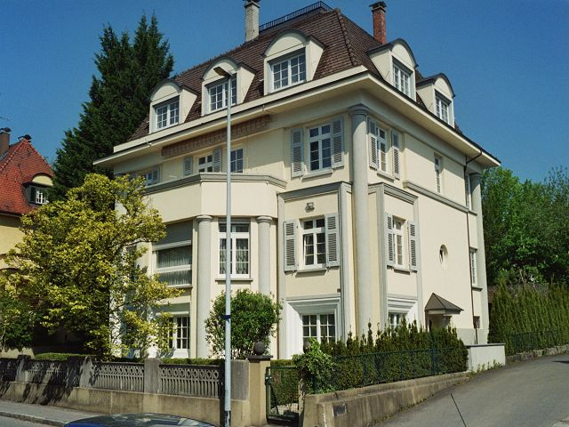 Denkmalgeschützte Villa Ott in der Schmidstraße 4 in Friedrichshafen. Baustil: Jugendstil. Erbaut: 1913/14 von Architekt Ernst Niederberger. Wohnhaus von Karl und Käthe Maybach von 1915 bis 1920